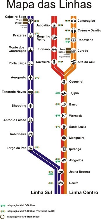 Mapa do Sistema Metrorec (Metrô do Recife)